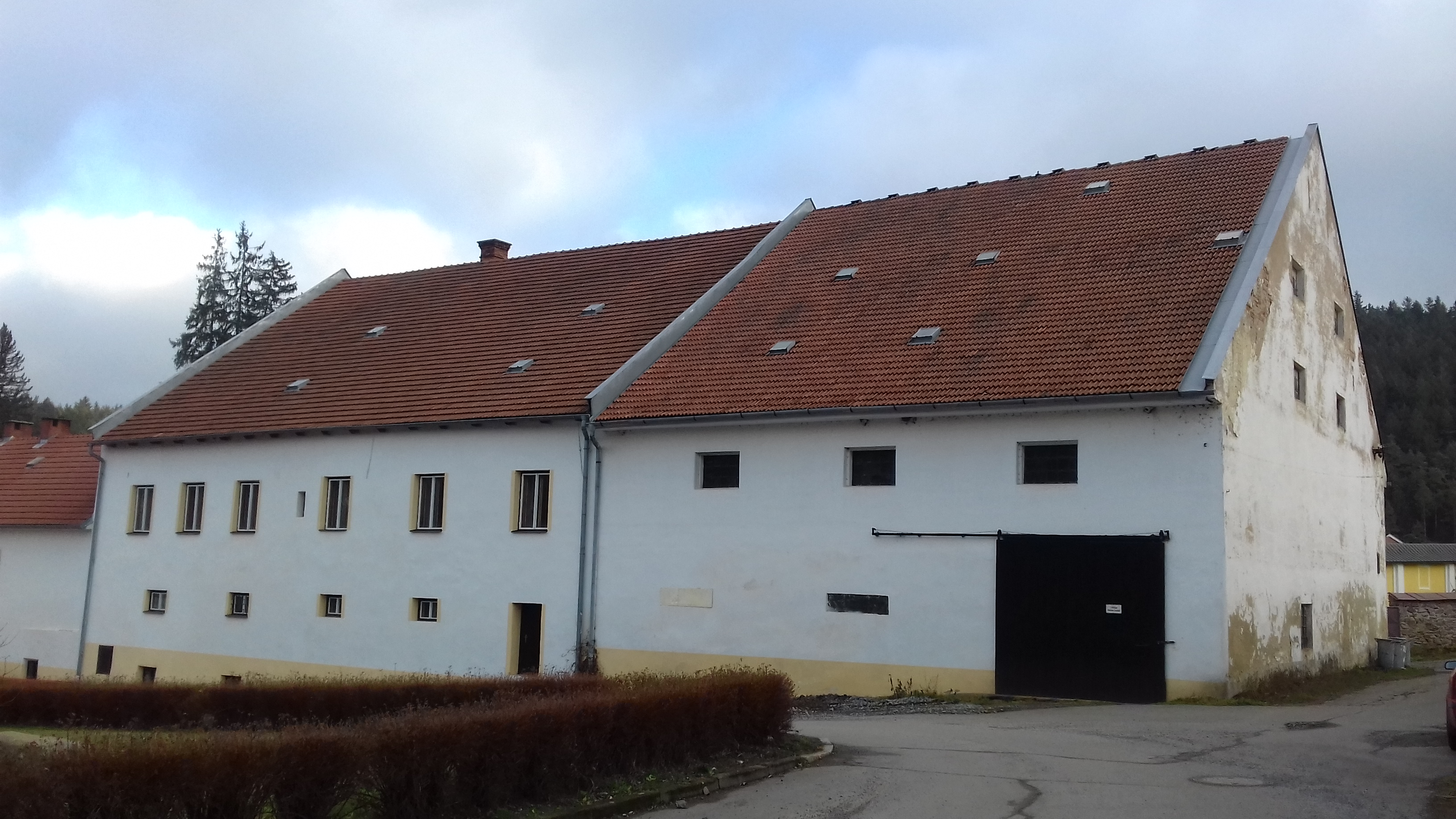 bývalý jimramovský pivovar (stav v roce 2017)